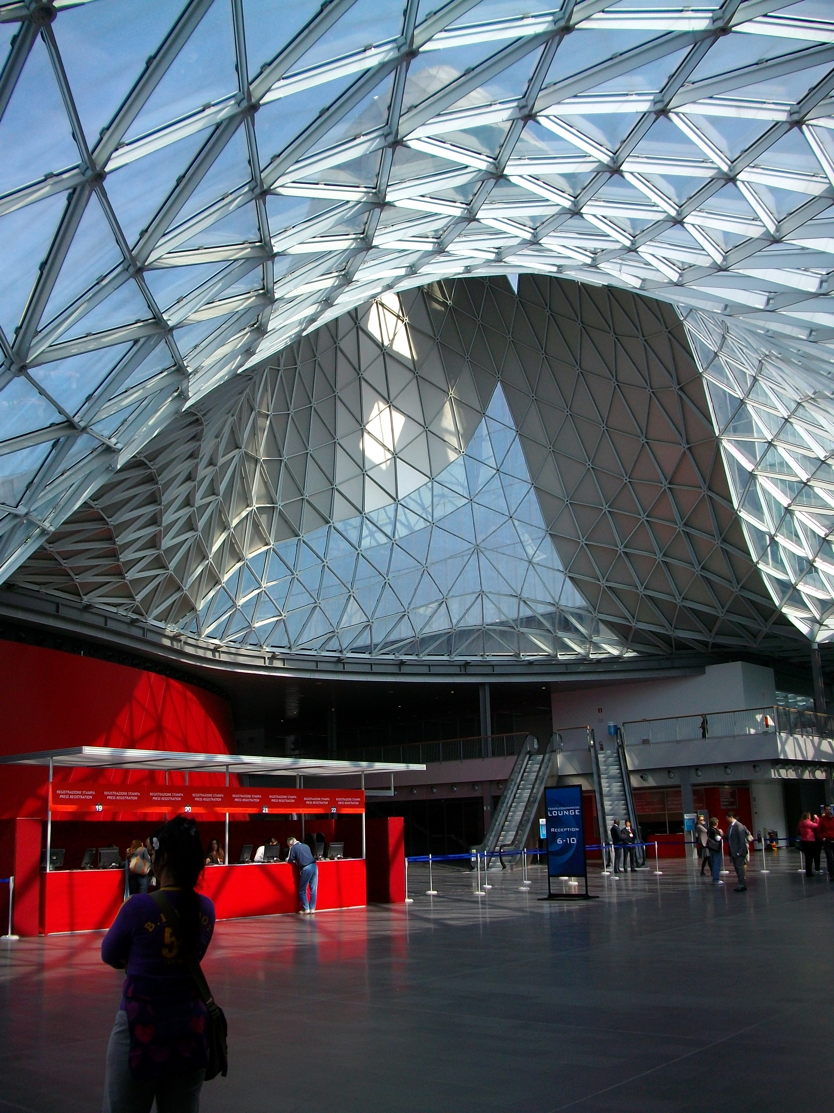 2005 wurde das 2Mio m2 große Messeareal der fieramilano in Rho / Pero eingeweiht. Seit 2006 im Vollbetrieb mit 20 Restaurants und 57 Bars, sowie 8 Hallen mit 345000m2 Ausstellungsfläche. Die 1,3km Distanz zwischen der 1. und der letzten Halle wird durch Laufbänder erleichtert.